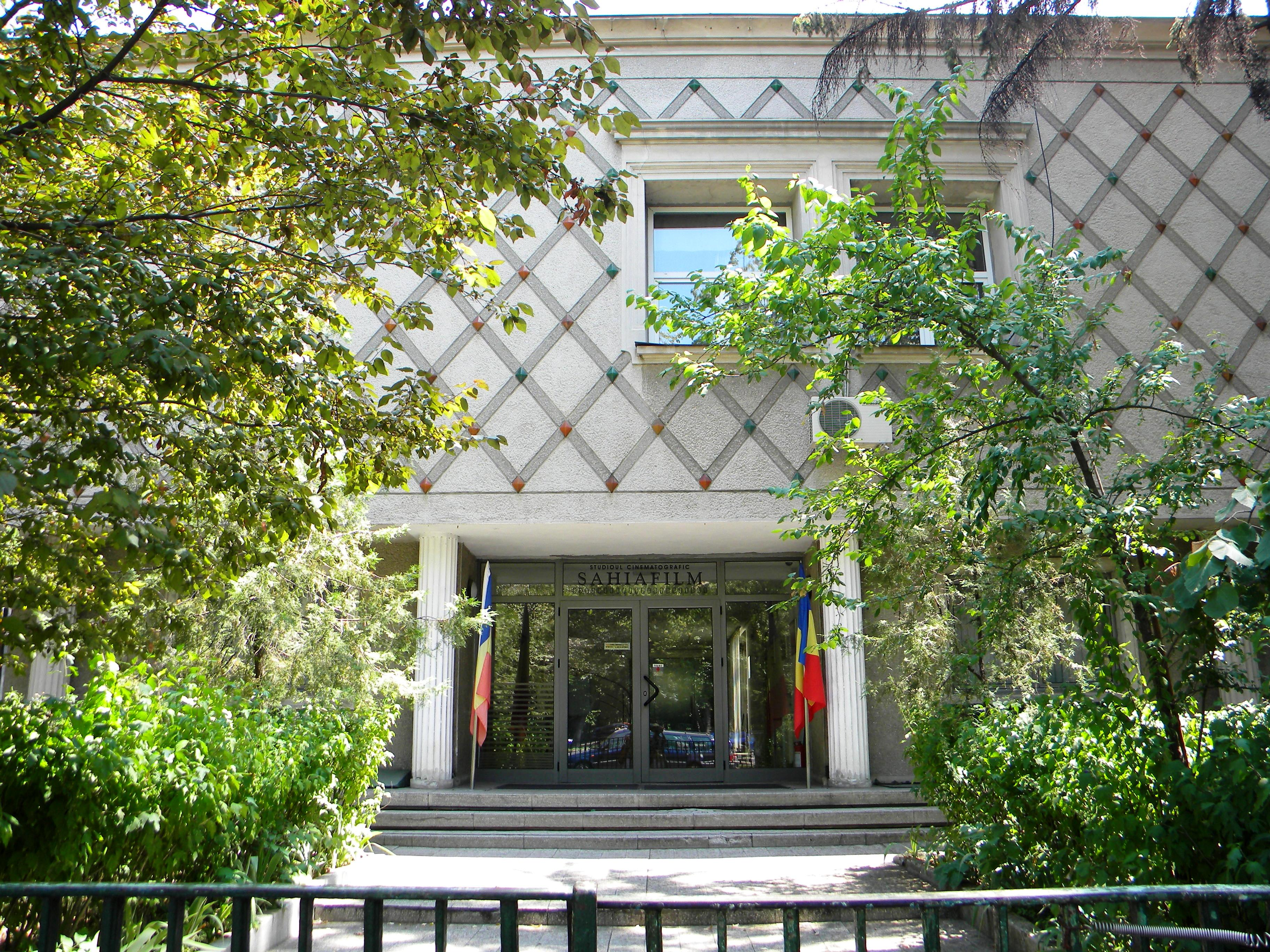 Imobil pe Bd. Aviatorilor, nr. 106, SAHIA FILM, Bucuresti sect. 1 (detaliu) (1)